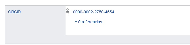 Vista do identificador ORCID de María Martinón-Torres en Wikidata